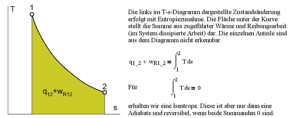 T-s-Diagramm.jpg